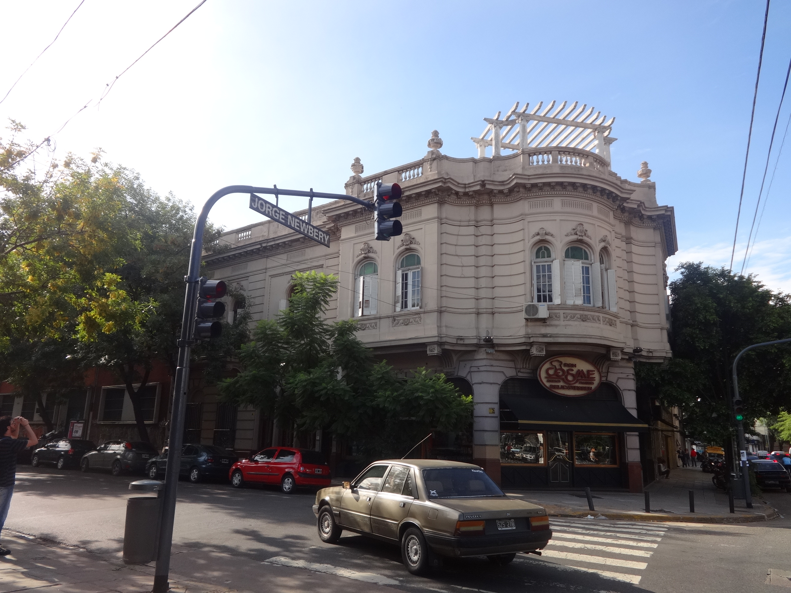 Edificio de la década de 1920/1930, en la esquina de Avenida Córdoba y Jorge Newbery. Buenos Aires, Argentina.